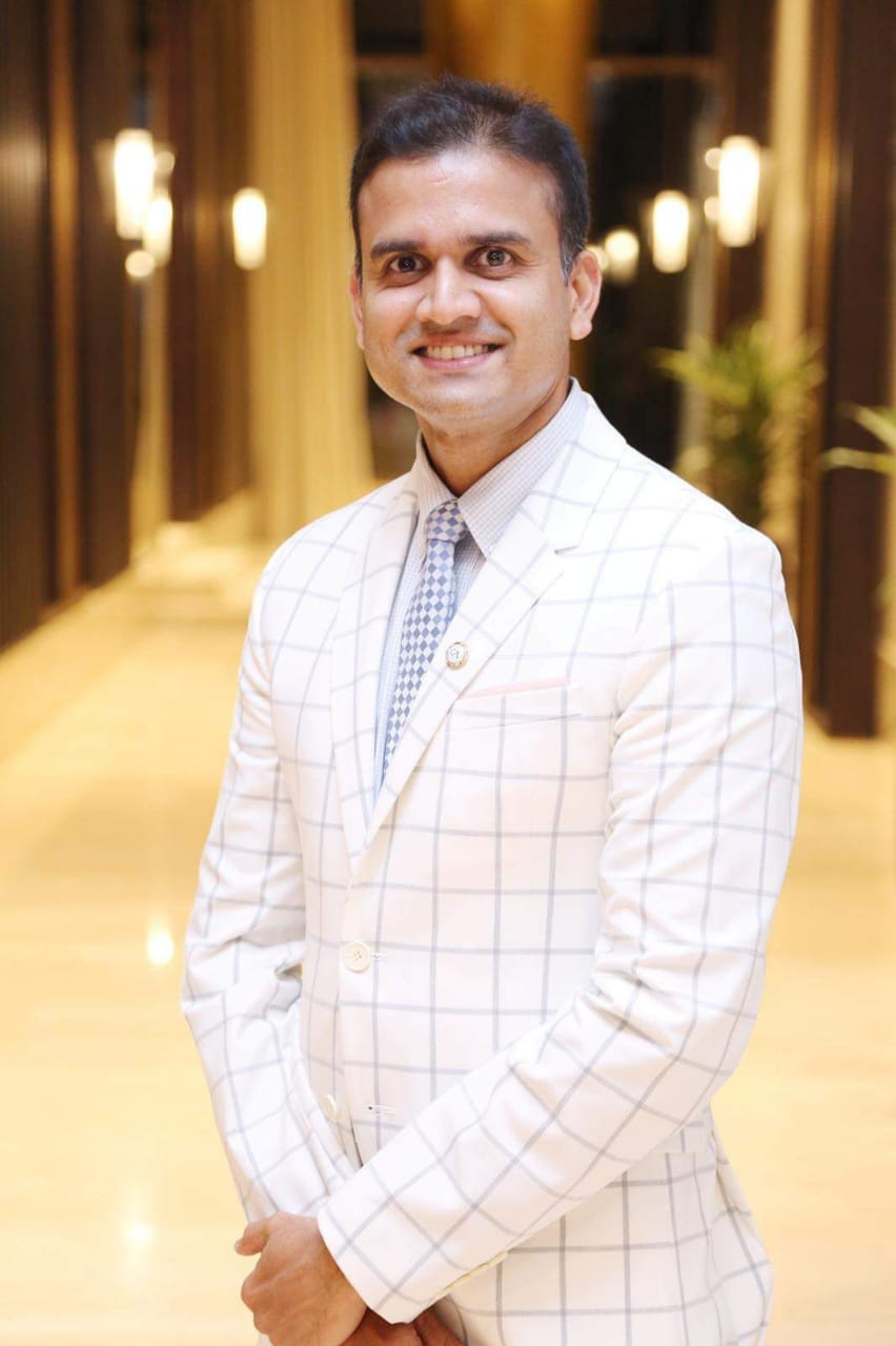 അയേൺമാൻ അബ്ദുൽ നാസർ